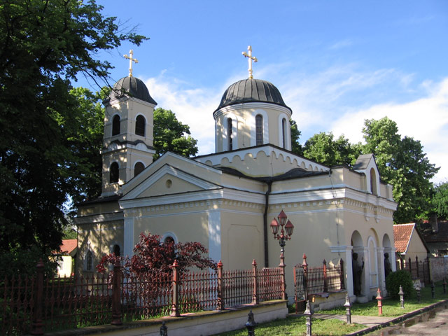 Православна църква в Петроварадин.